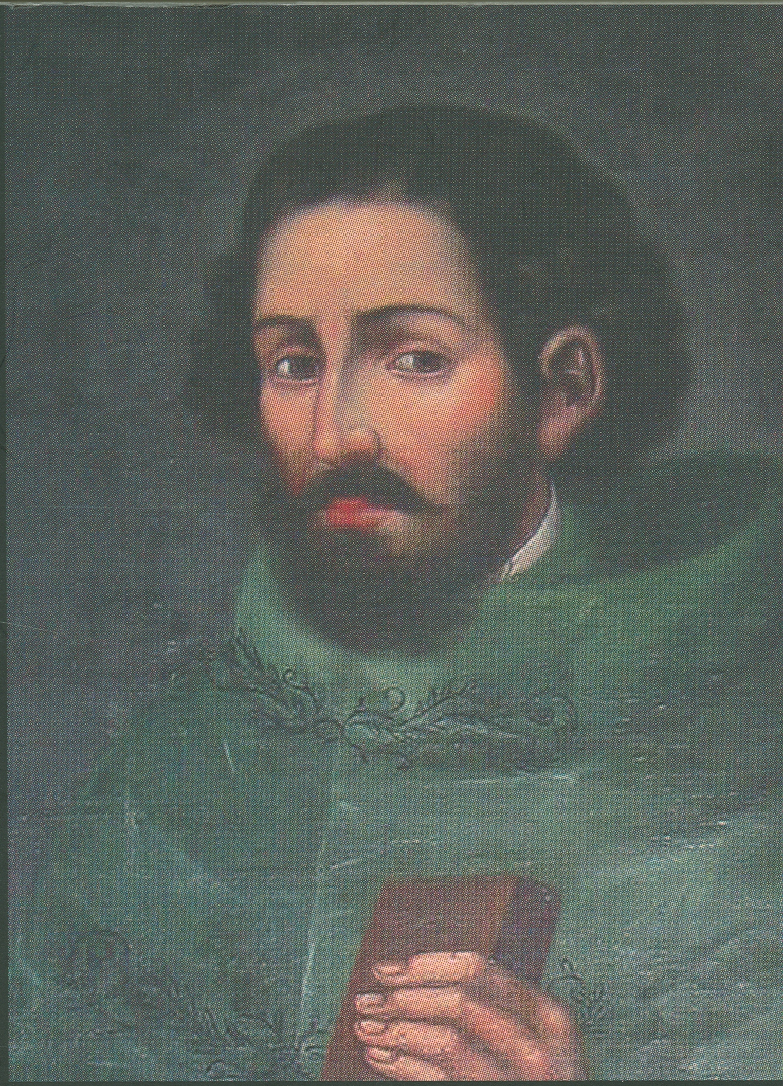 Imagen de escáner cuyo contenido conforma el protganismo de una portada hallada en el Libro Sucesos de las Islas Filipinas que fue transcripto por la autora Francisca Perujo en una version del año 2007 y que orginalmente fue escrito por Antonio de Morga